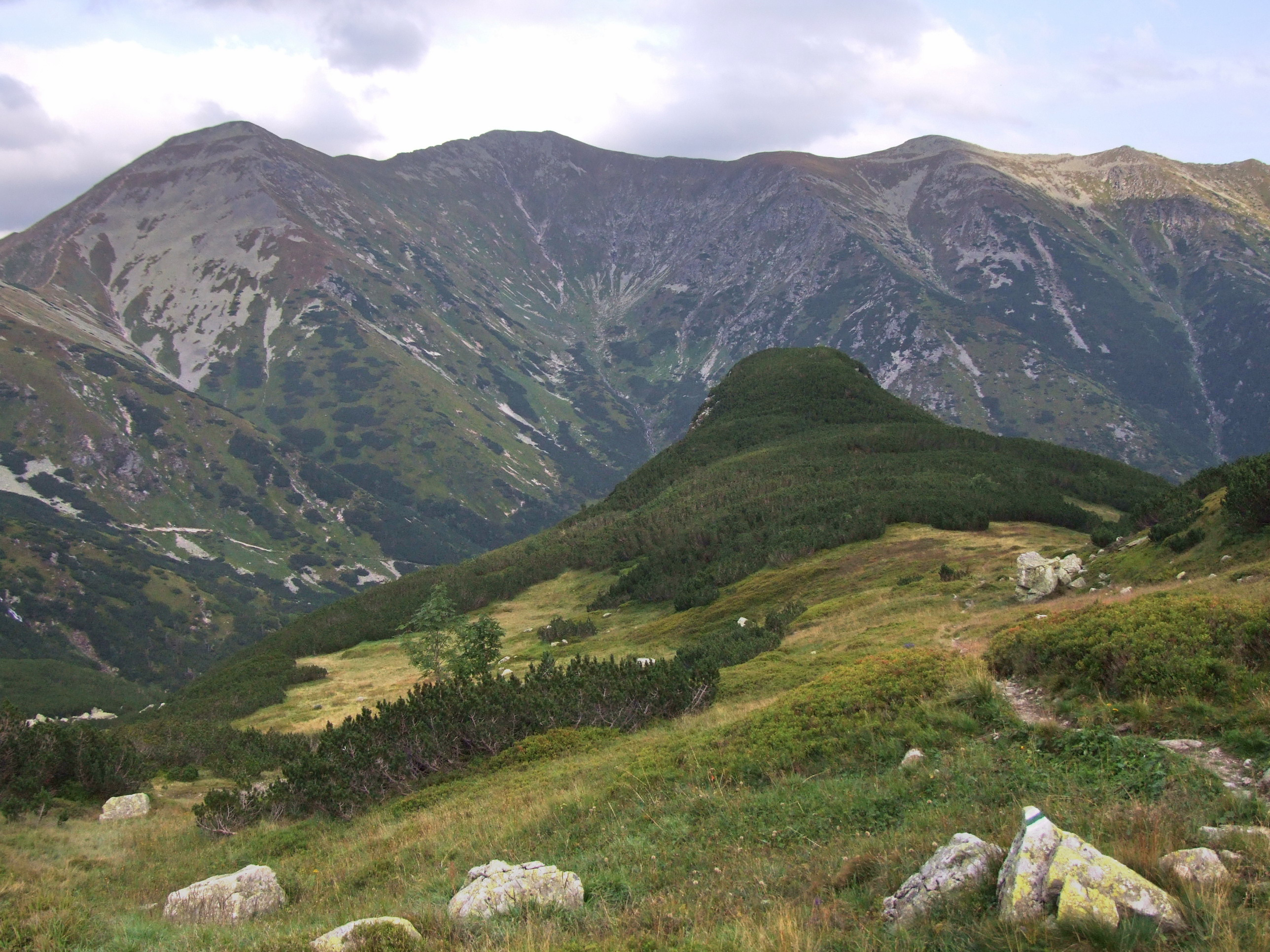 Otargańce, Czarna Kopa, Jamnicka Dolina (West Tatra Mountains)